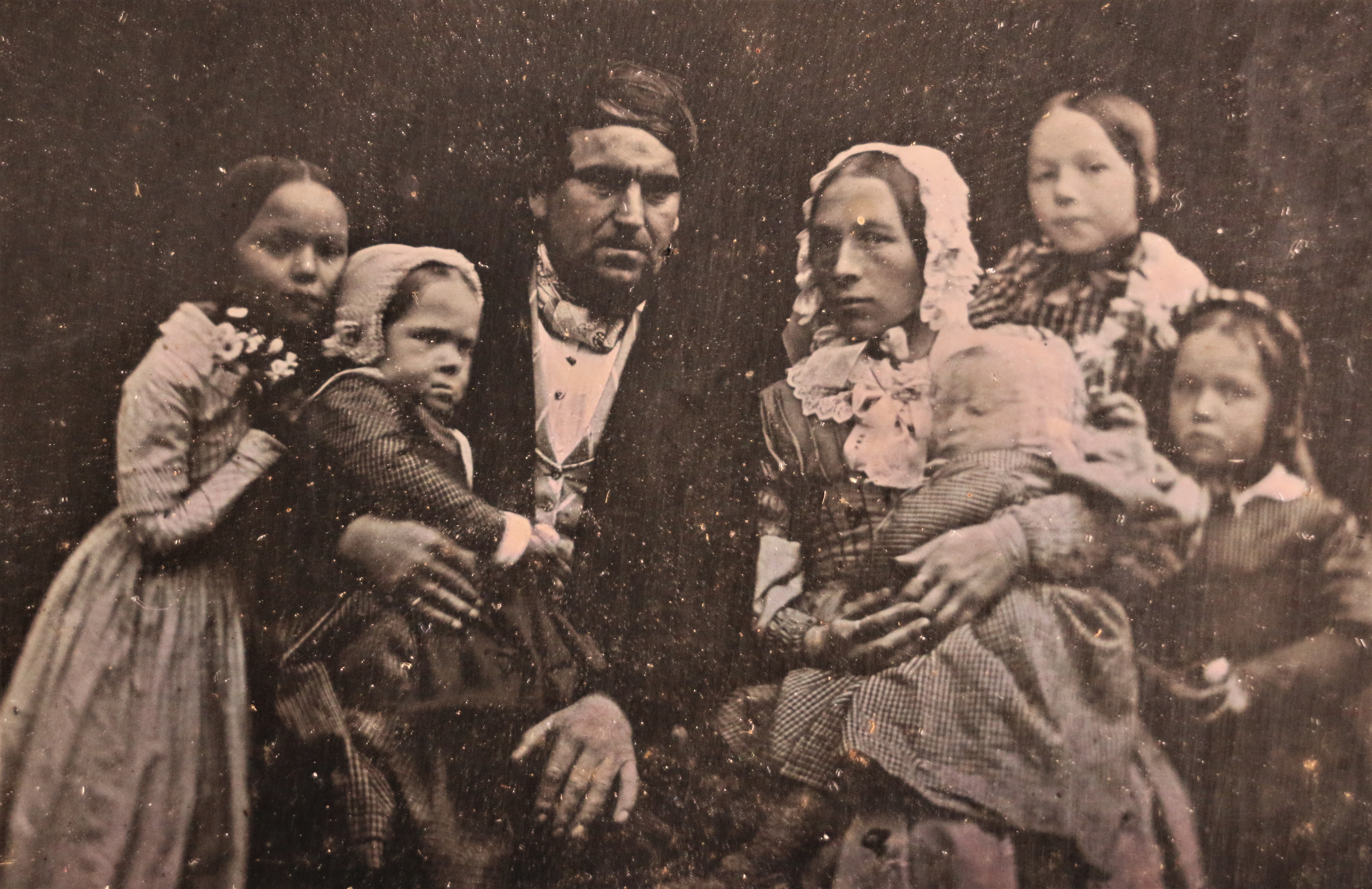 Daguerréotype par Truchelut, 20 novembre 1845 © Christophe Dubois Rubio